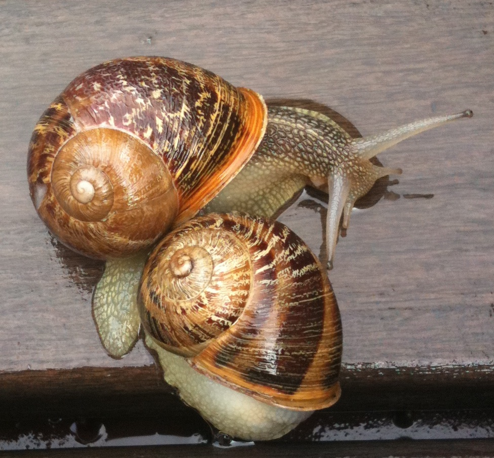 Helix aspersa